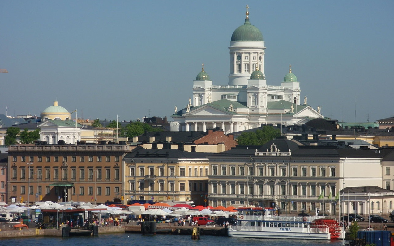 Helsingin tuomiokirkko. Kuva on otettu M/S Silja Serenadelta